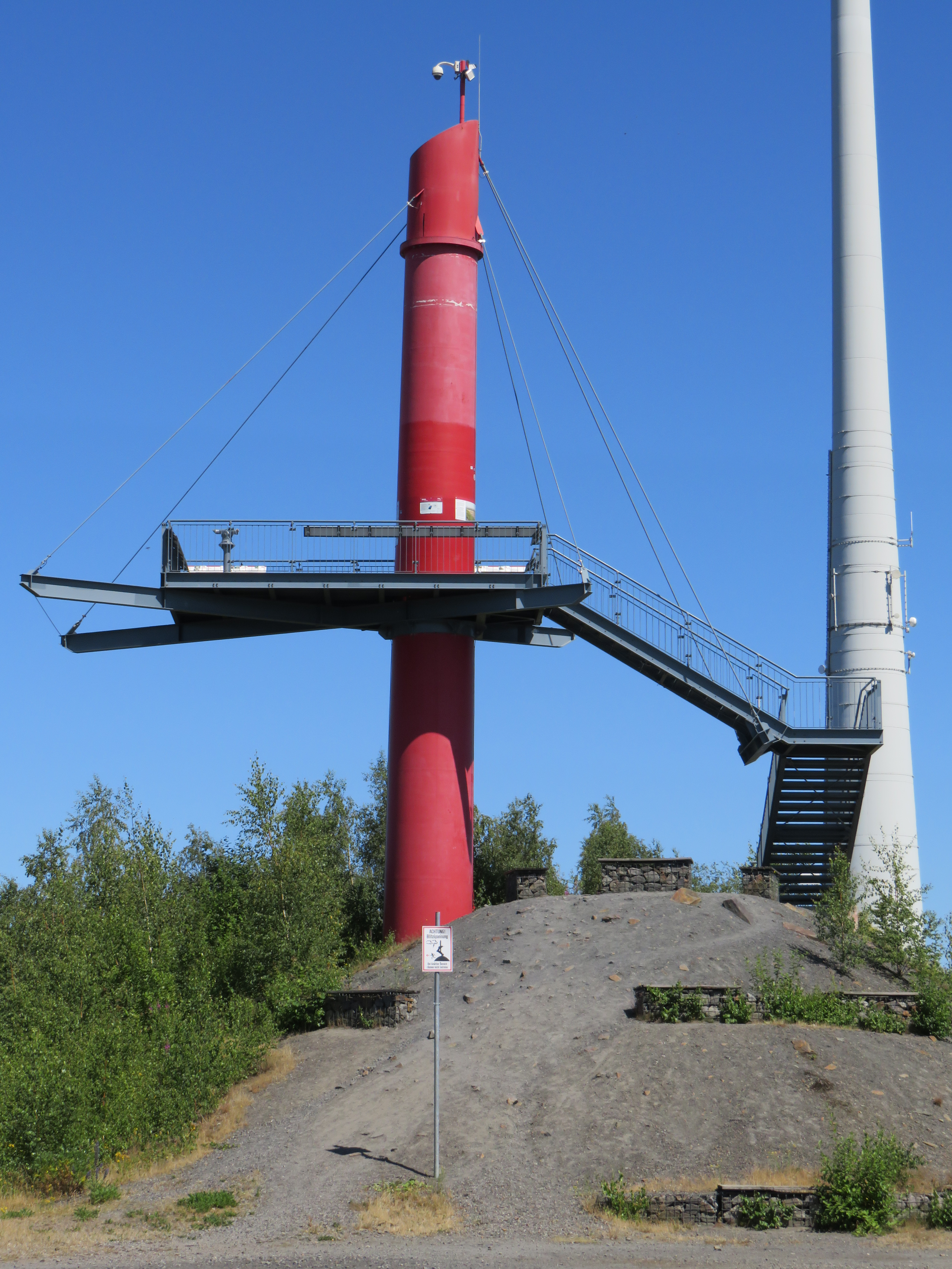 Gesamtansicht des Aussichtsturms auf dem Piesberg